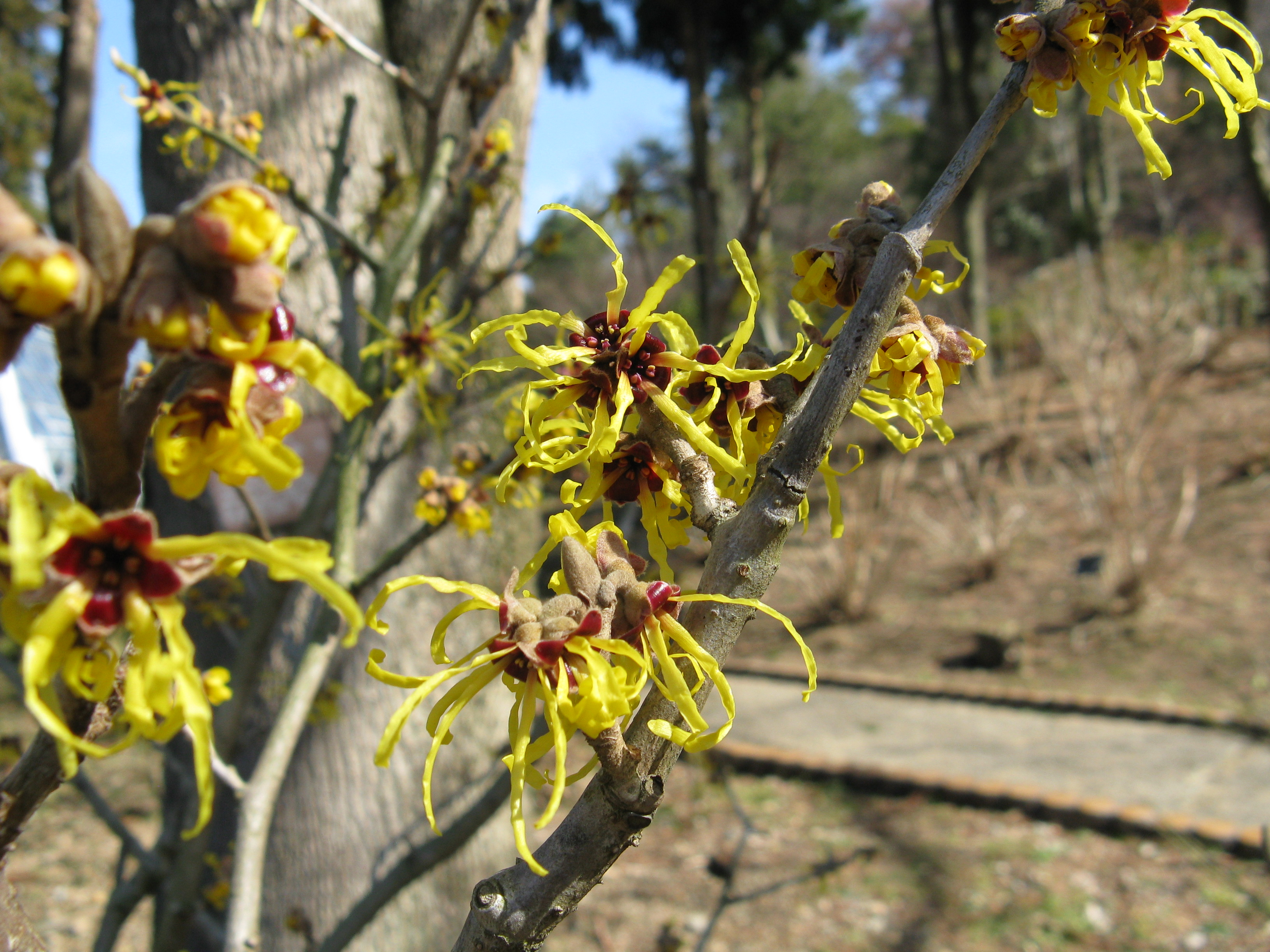 Hamamelis japonica